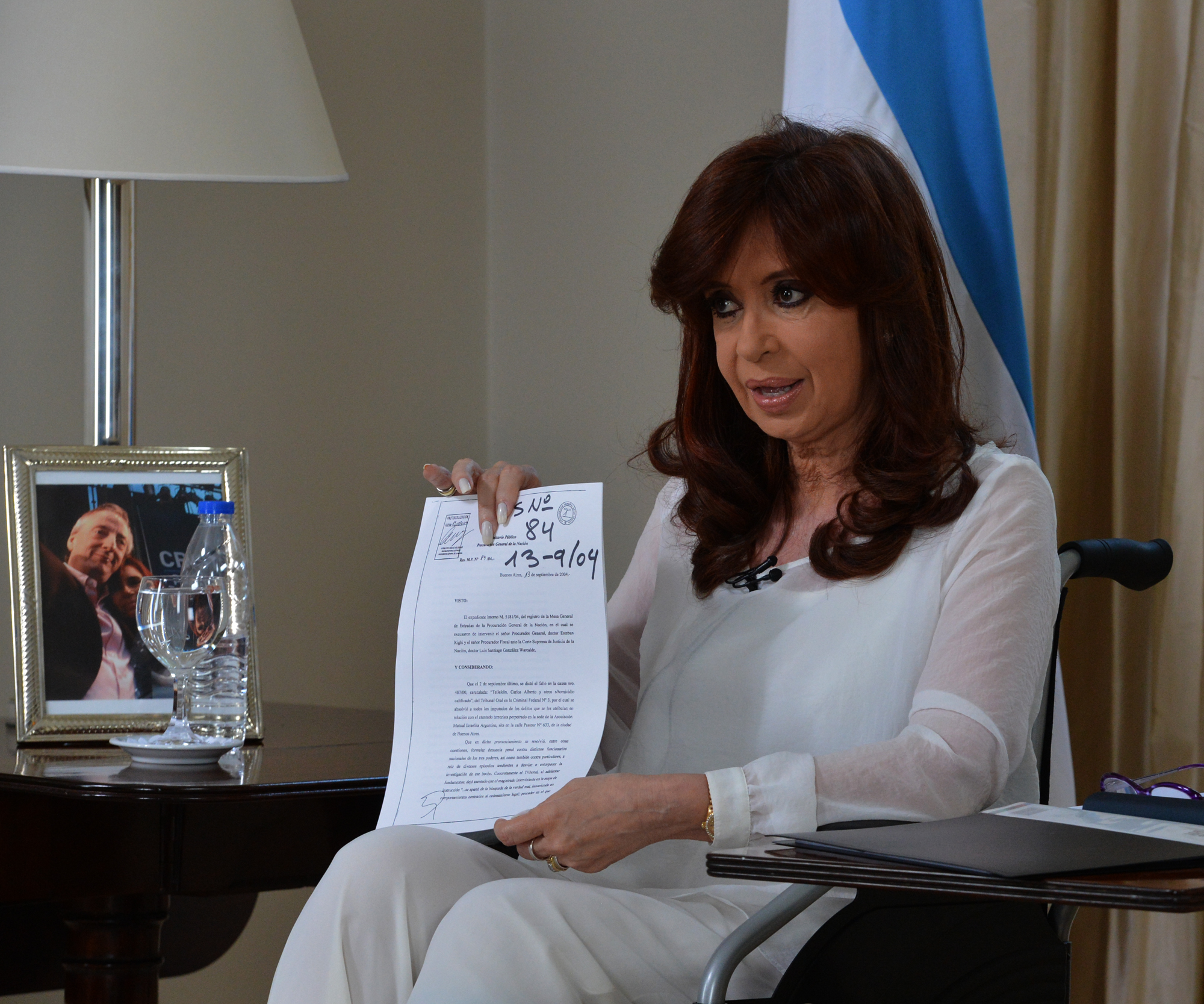 Anuncio de la disolución de la SI y la creación de la Agencia Federal de Inteligencia